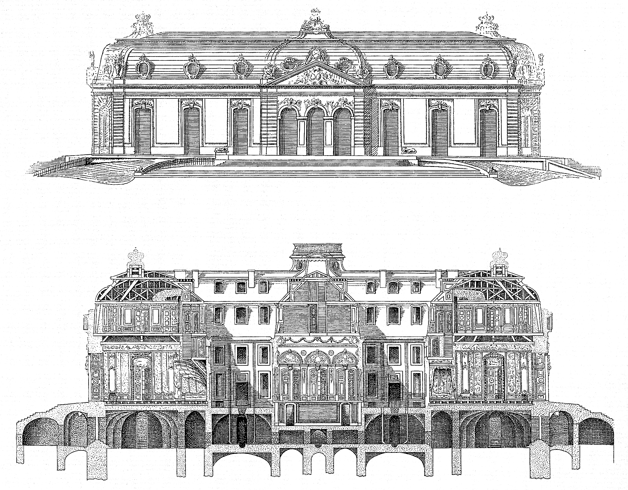 Federzeichnung des Erbauers Nicolas de Pigage